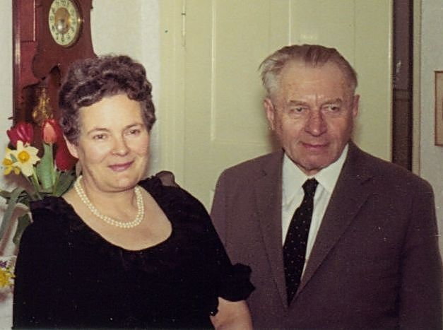 Josef Schelb mit Ehefrau Lotte Schelb vor Jugendstiluhr und Blumen